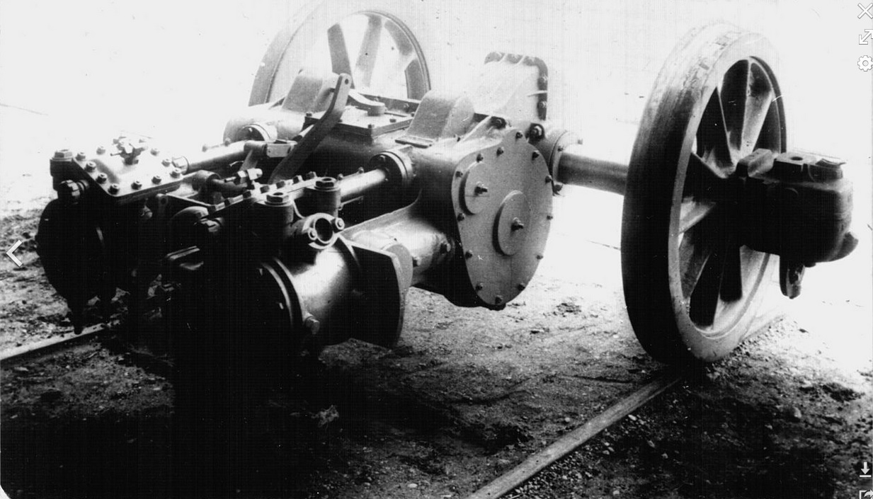 Foto der Dampfmaschine Bauart de-Dion-Bouton